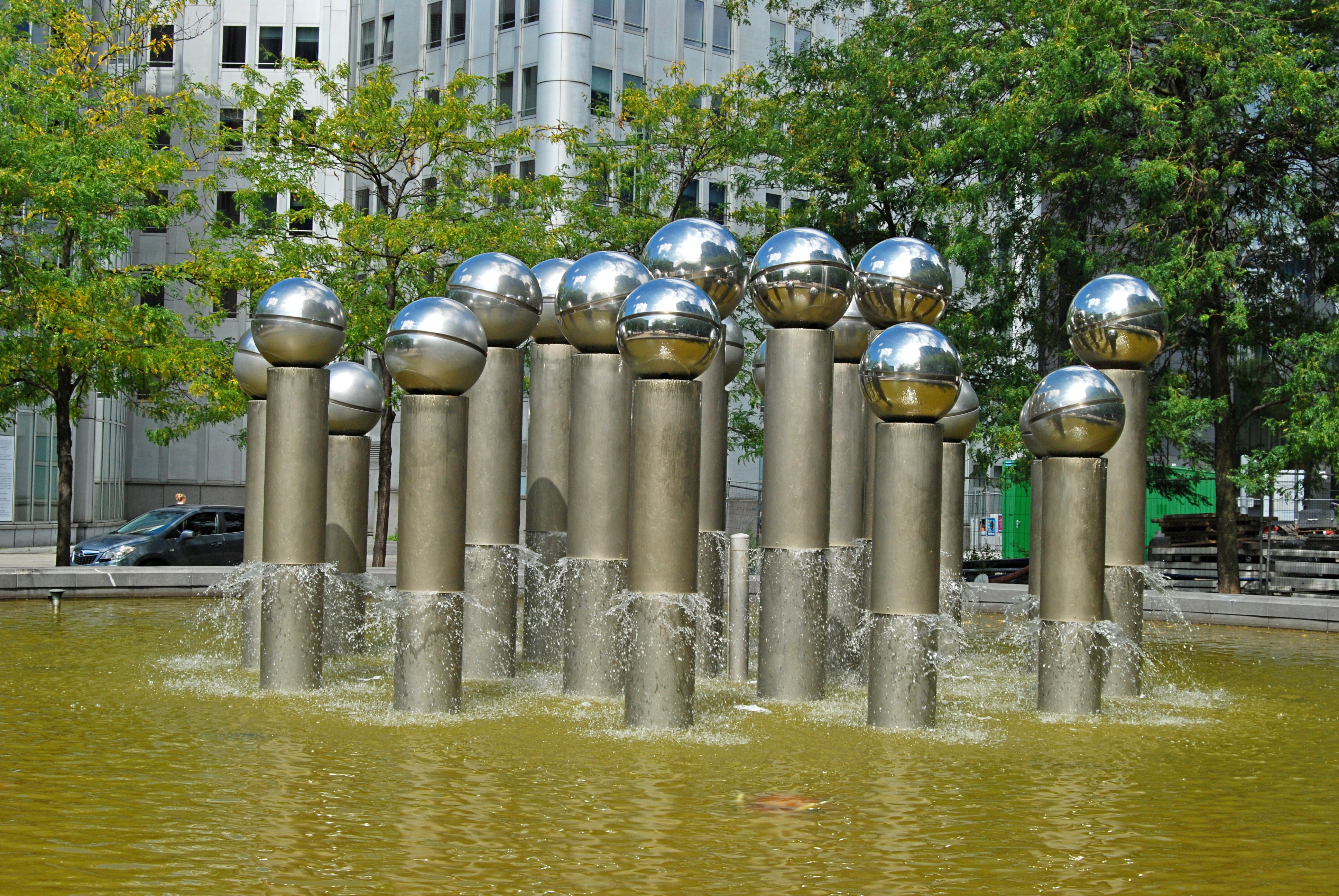 Sculptures de Pol Bury devant le bâtiment « Boudewijn » ou « Noord Building » (administration de la Région flamande), boulevard Baudouin 30 This photo of immovable heritage has been taken in the Brussels Capital Region